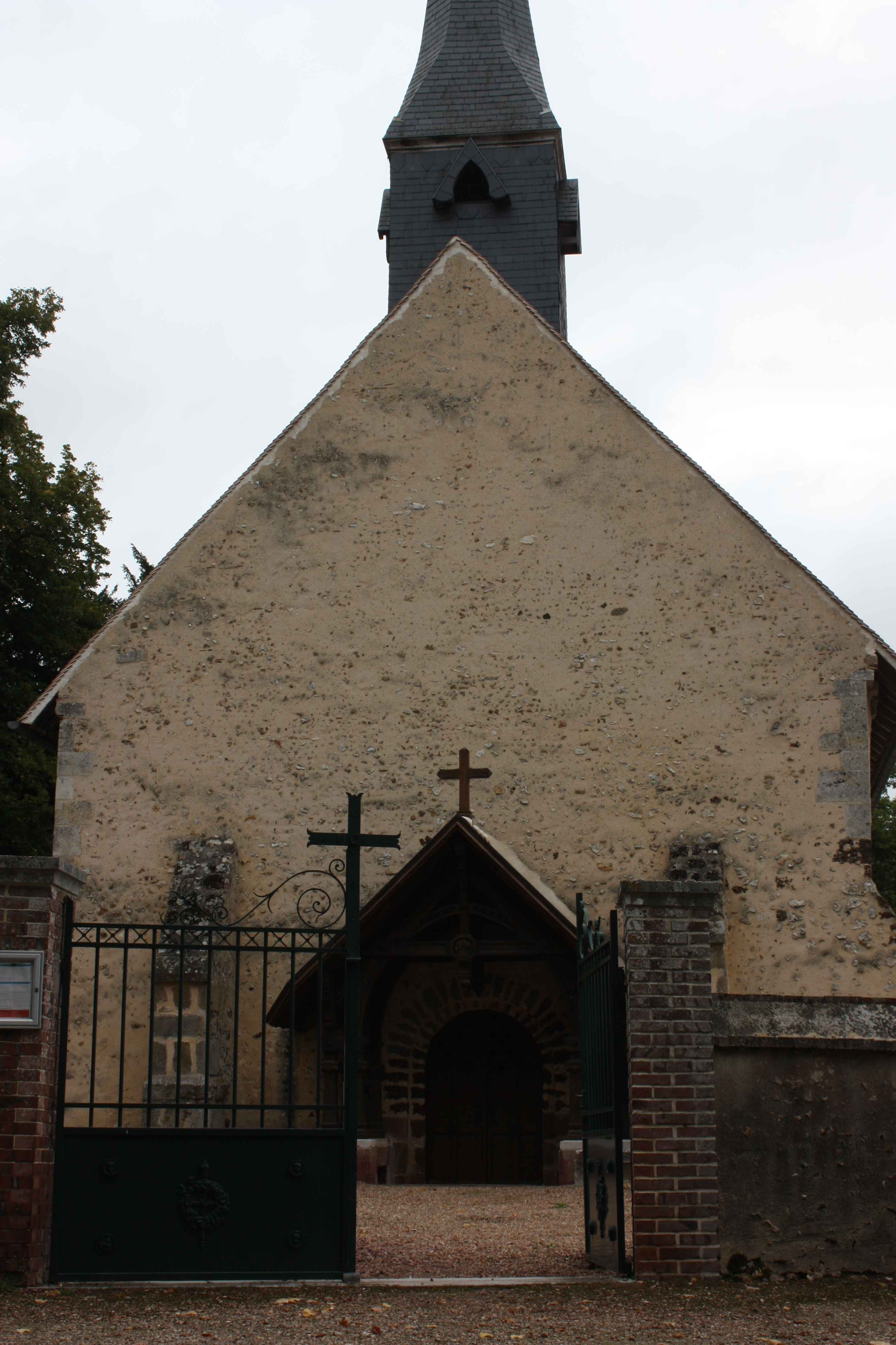 église Saint-Germain, Escorpain, Eure-et-Loir, France.